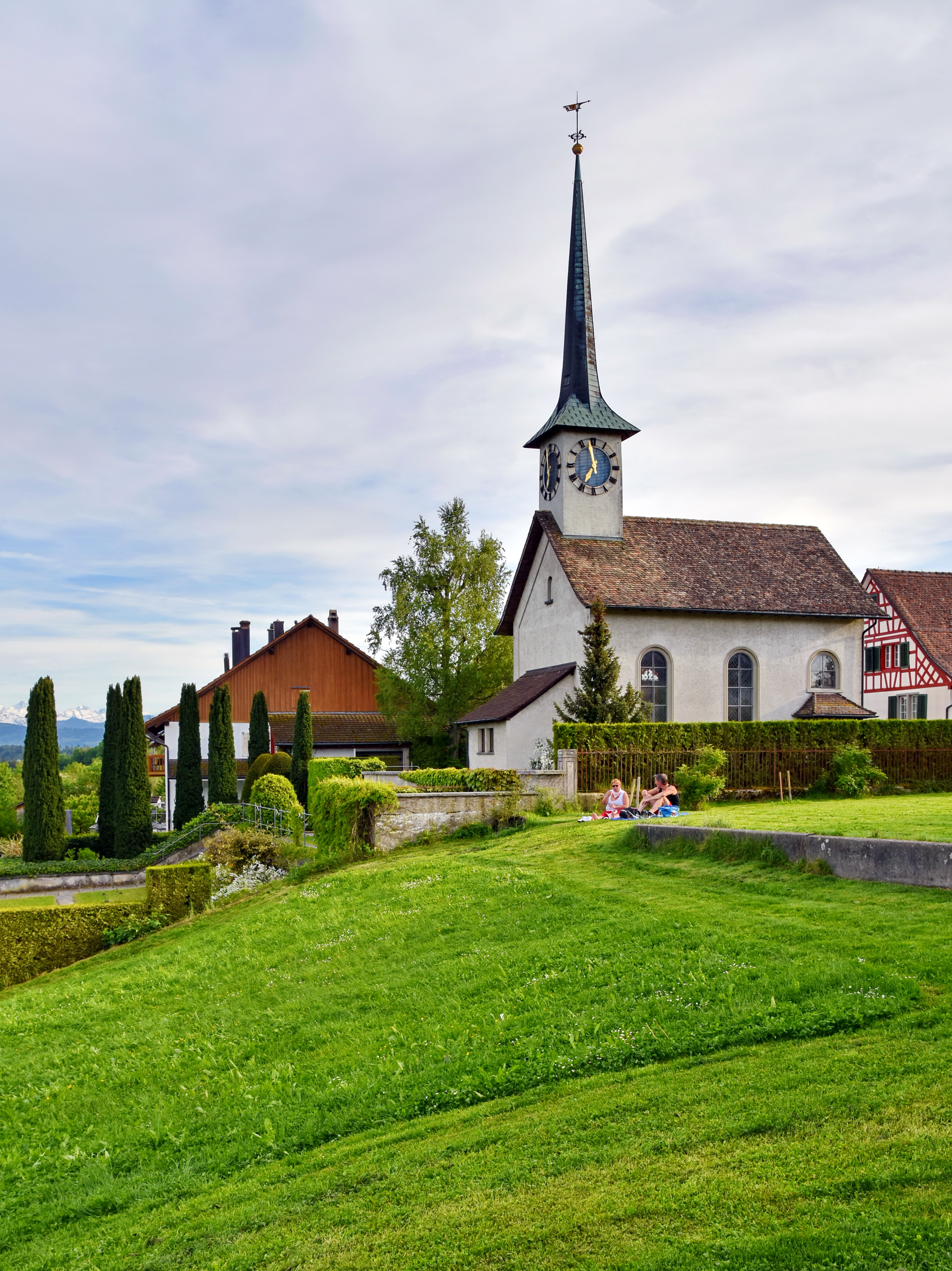 Reformierte Kirche Seegräben as seen from Jucker Farm in Seegräben (Switzerland)